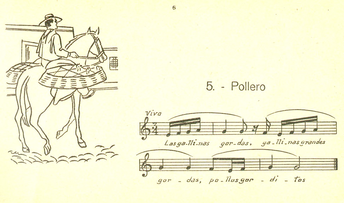 Pregón del "La voz de Pasado" por María Luísa Sepúlveda